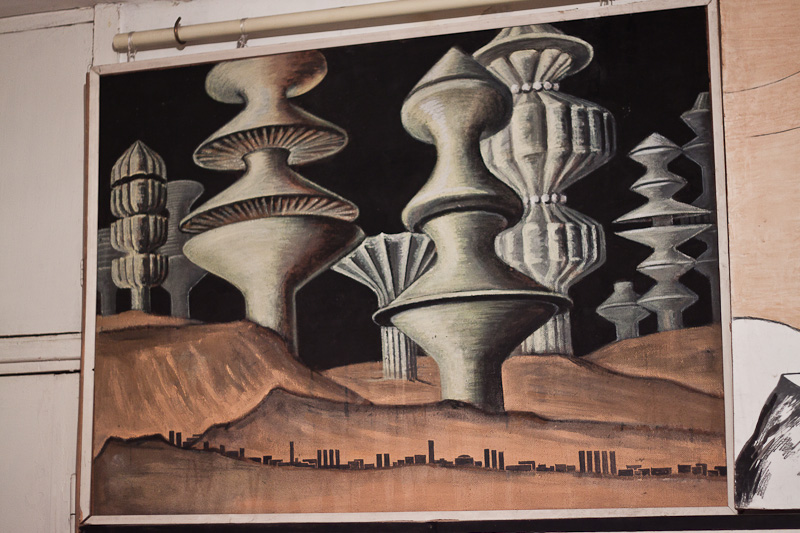 Ապագայի քաղաքի կոնցեպտ, հեղինակ Վան Խաչատուր